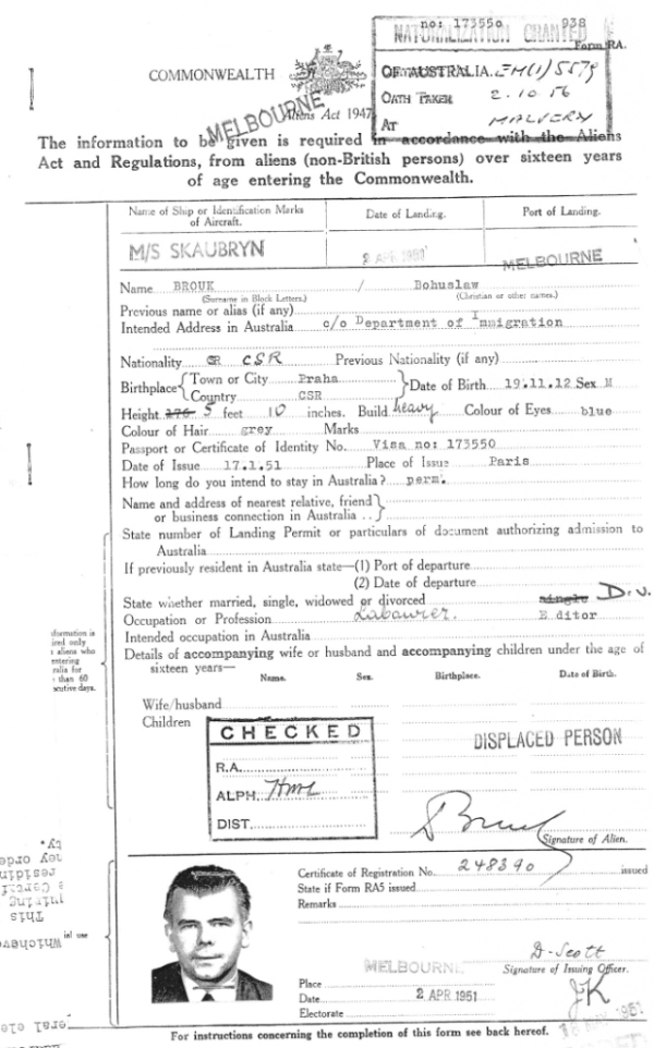 (Tato rubrika obsahuje fotografie z průběhu celého Broukova života, tzn. z let 1912-1978.)